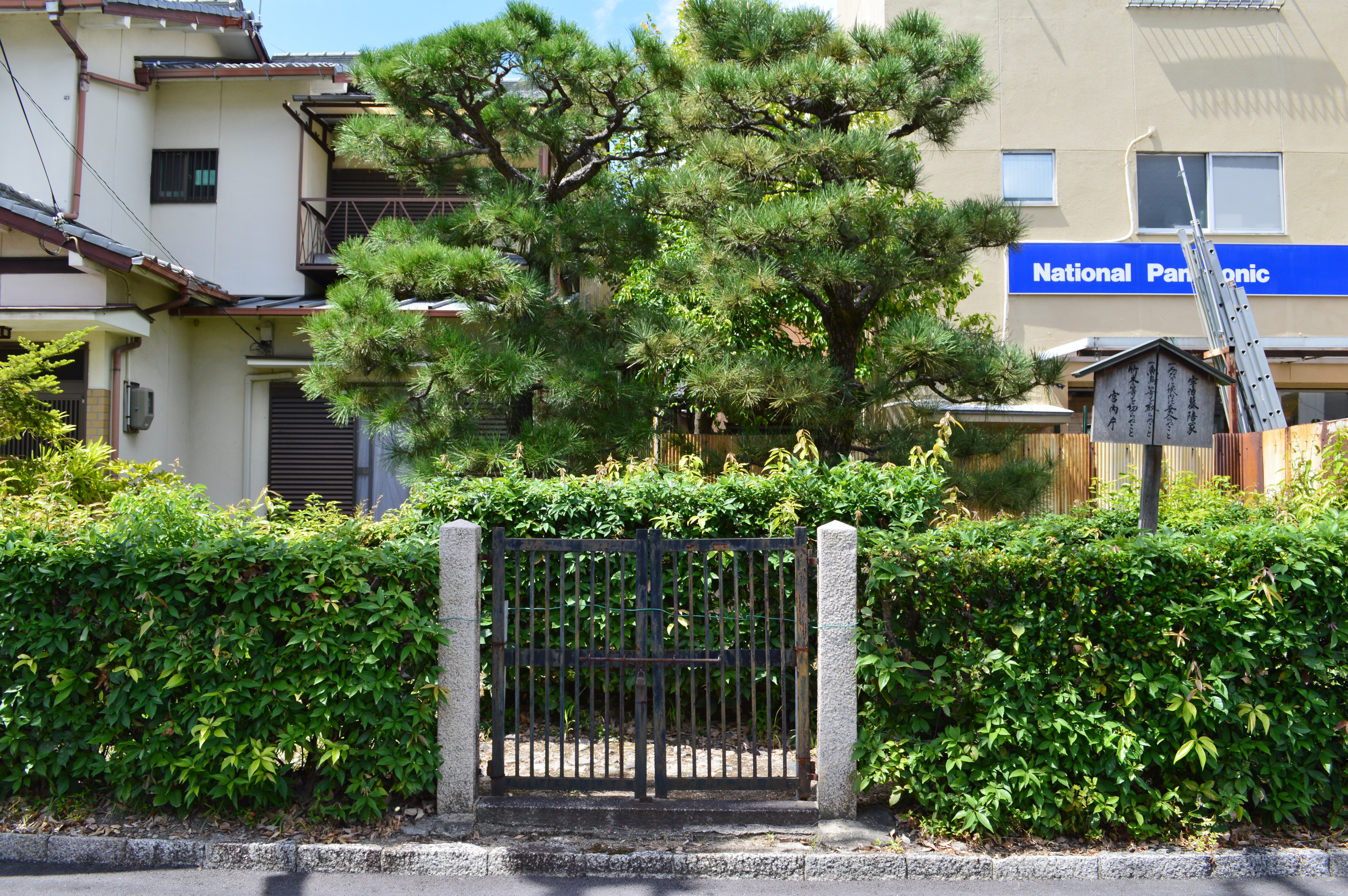 菟道稚郎子尊宇治墓 飛地い号（伝賀陽豊年墓）